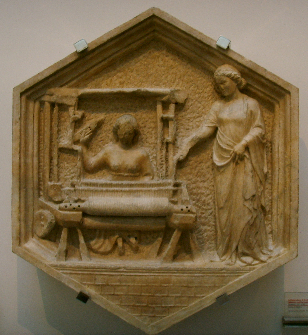 Formella 12, arte tessile, andrea pisano, 1334-1336